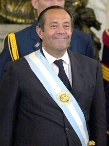 Presidente de la Nación Argentina. Asume tras ser proclamado por la Asamblea Legislativa.